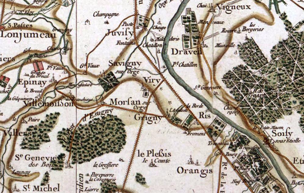 Carte de Viry-Châtillon (91) au XVIIe siècle par Cassini.